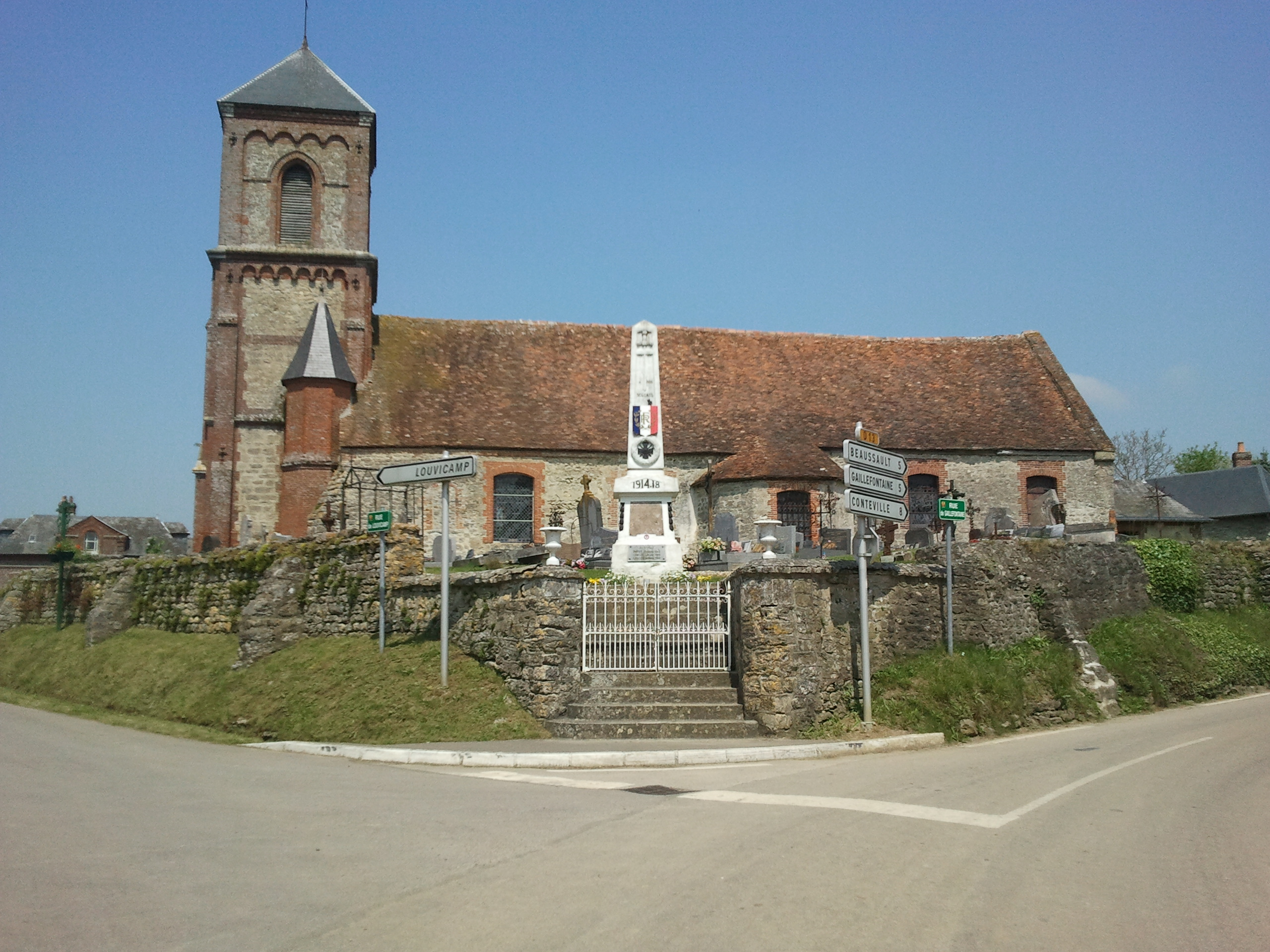 église de Compainville